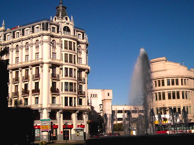 Plaza de Ordoño II. Centro de la ciudad de León.